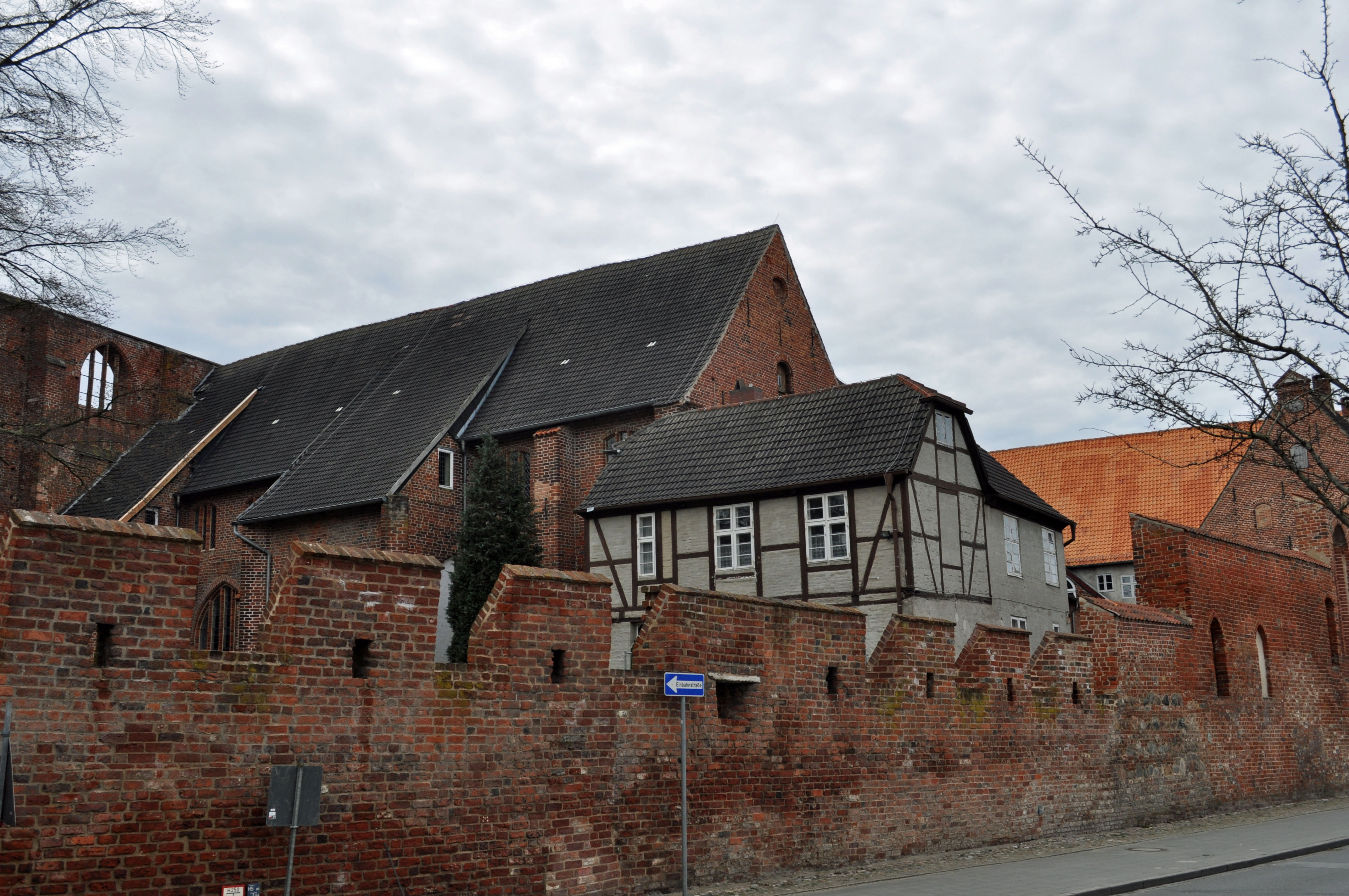 Gebäude bzw. Gebäudedetail in Stralsund. Straße und Hausnummer siehe Dateiname.